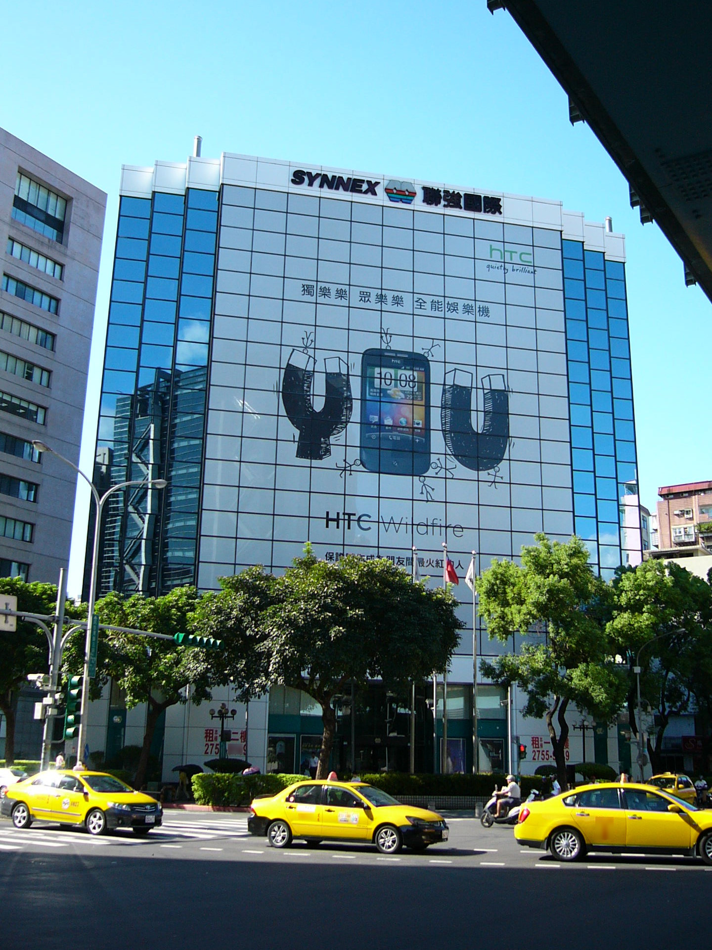 聯強國際總部，位於臺北市中山區民生東路三段75至77號。